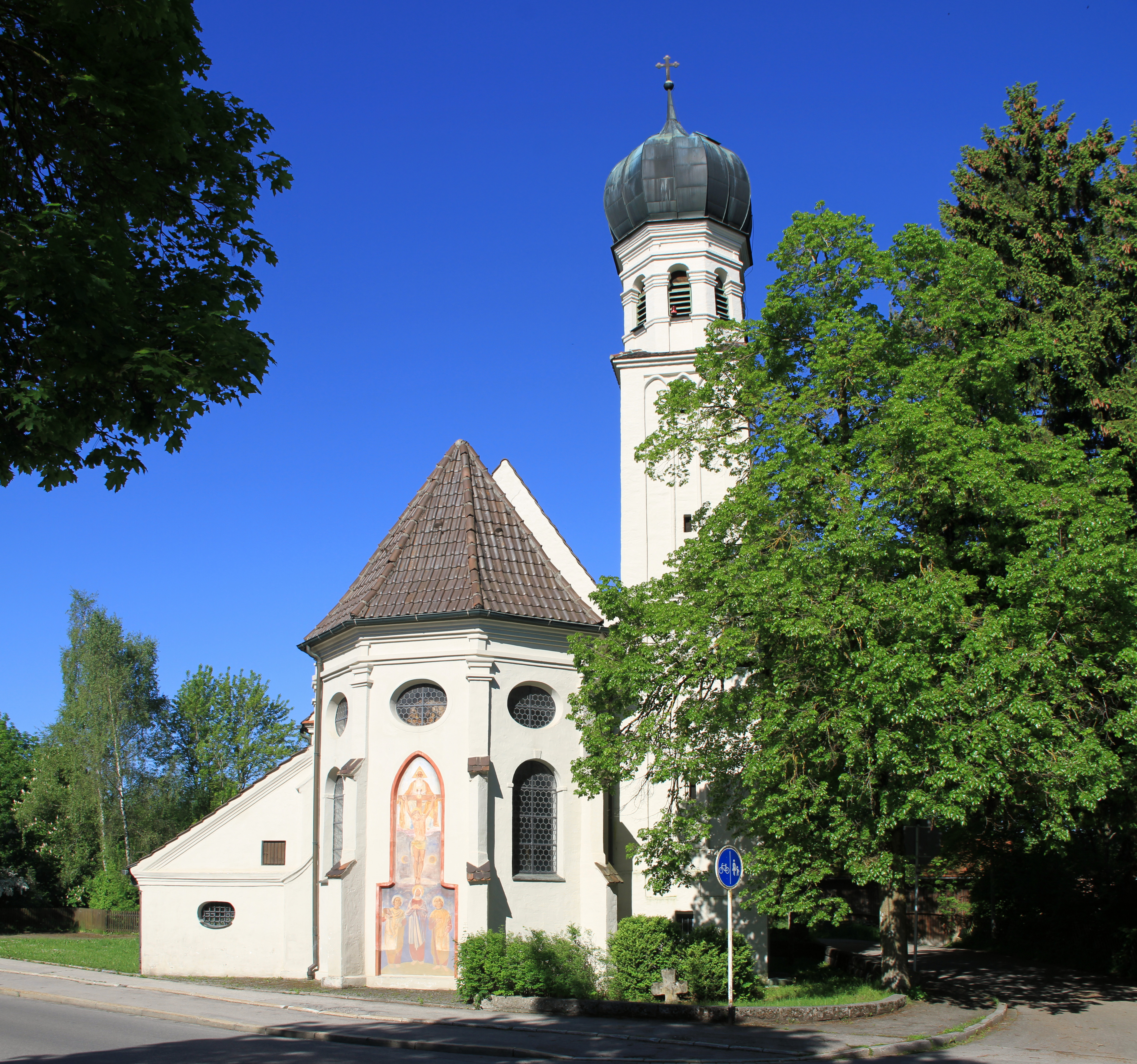 Das ist die Kirch St. Cosmas, die am Oberbeurer Weg gegenüber dem Haupteingang zum Fliegerhorst Kaufbeuren steht. Die Abbildung entstand aus drei Fotos, die hier zu einem Panorama zusammengesetzt wurden.